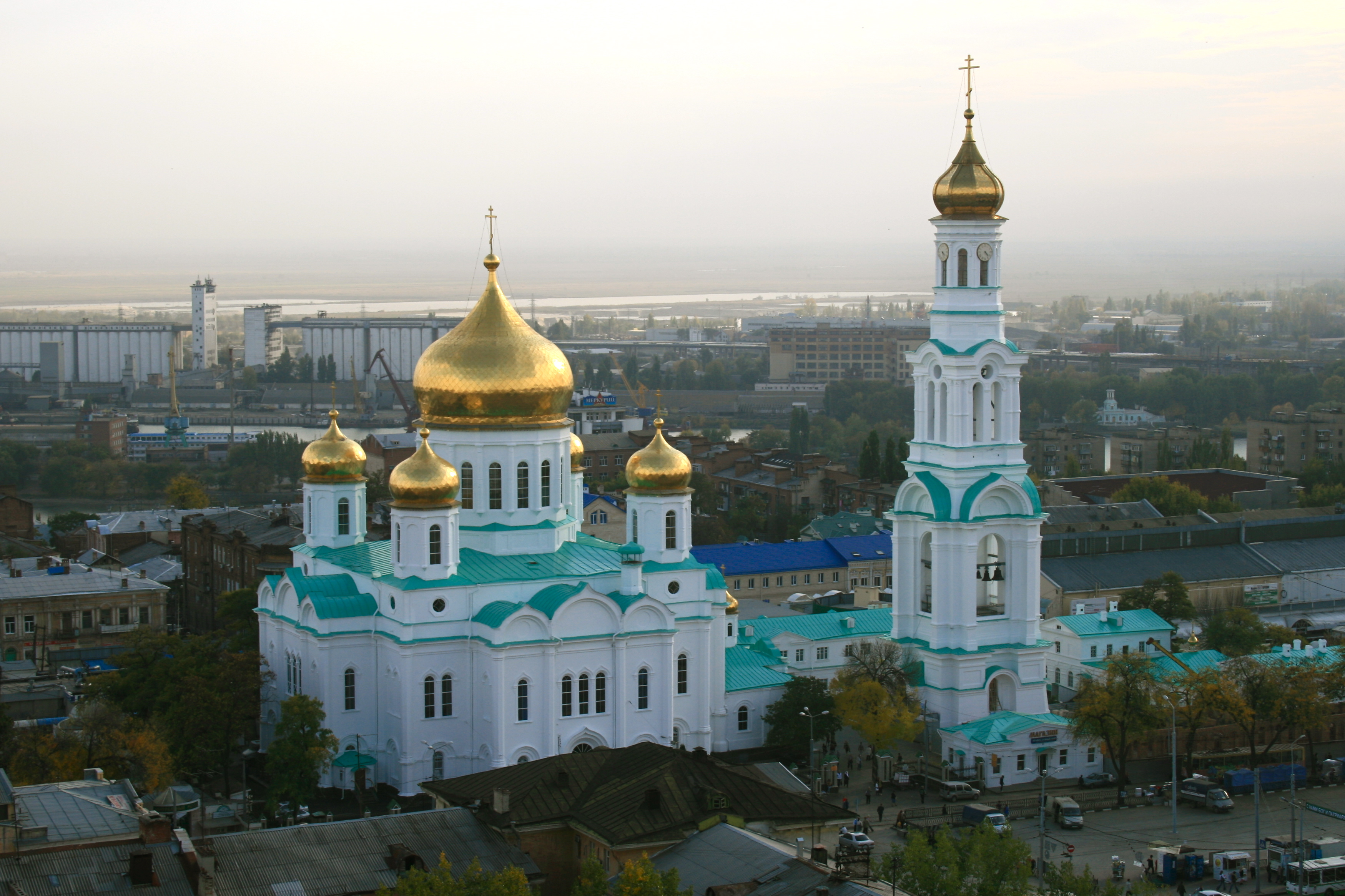 Кафедральный собор рождества богородицы (Ростовская область, Ростов-на-Дону, станиславского улица, 58)